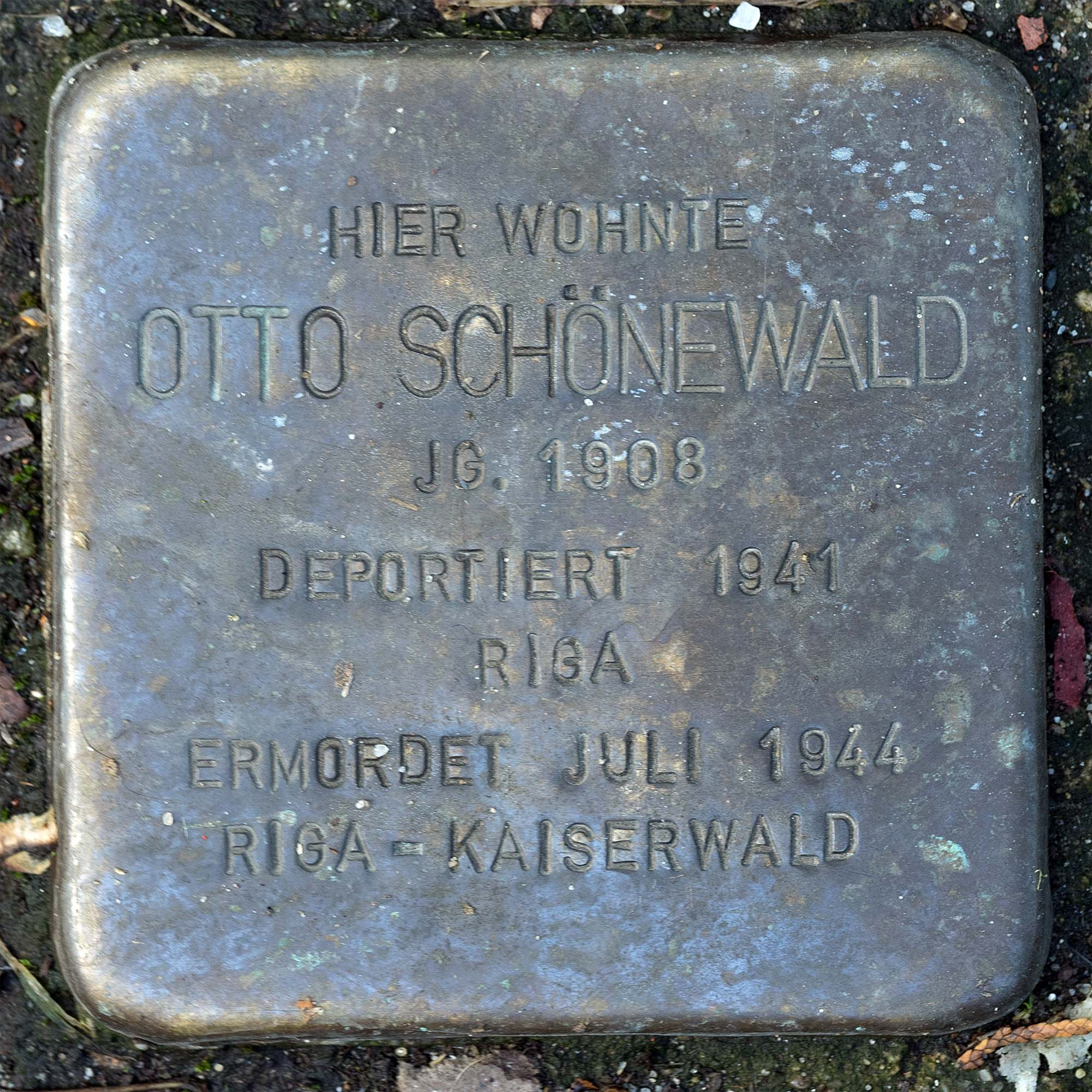 Stolperstein für Schoenewald Otto